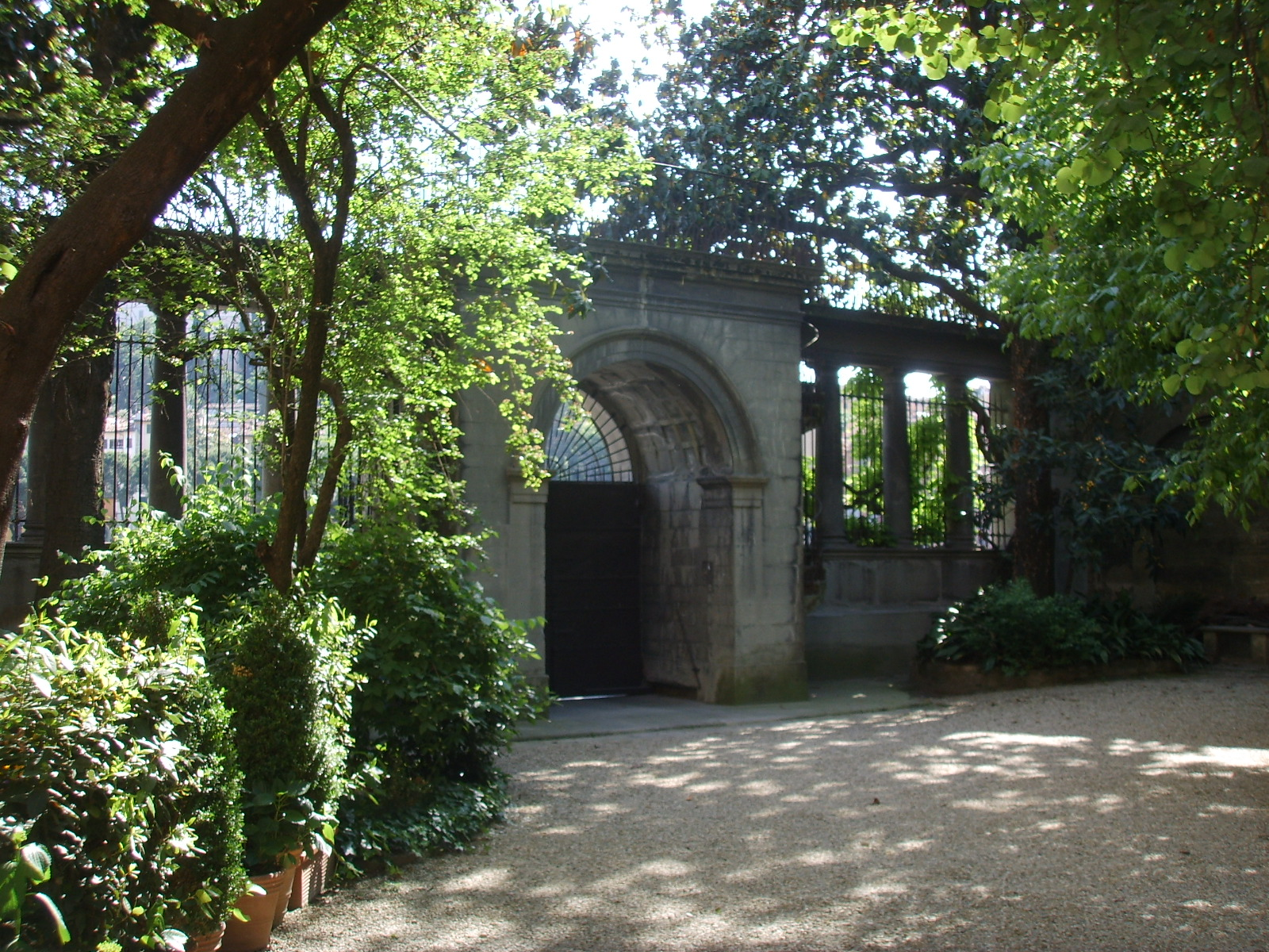 Palazzo malenchini alberti, giardino